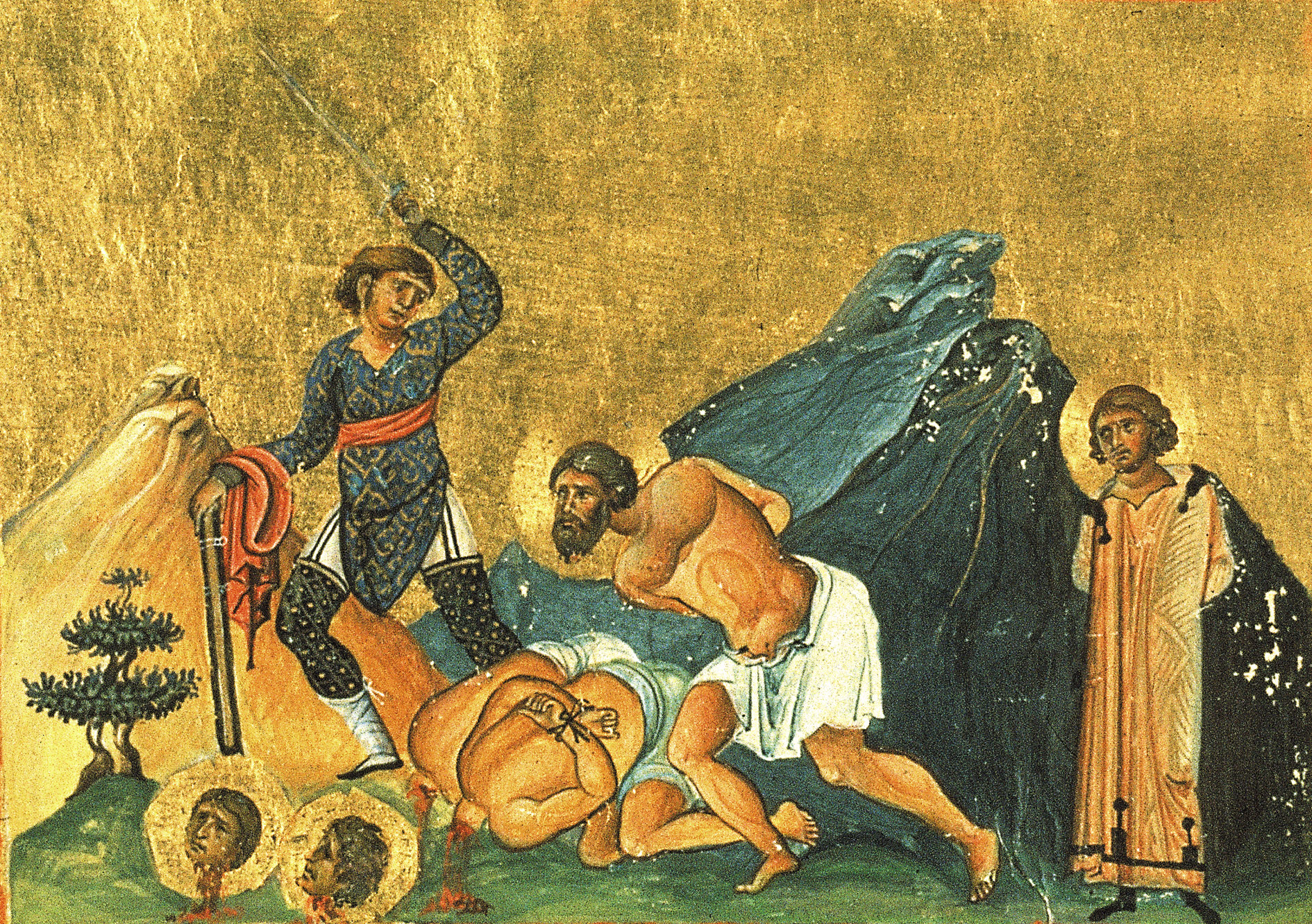 Мученики Акила, Валериан, Евгений, Кандид Трапезундские Константинополь. 985 г. Миниатюра Минология Василия II. Ватиканская библиотека. Рим.